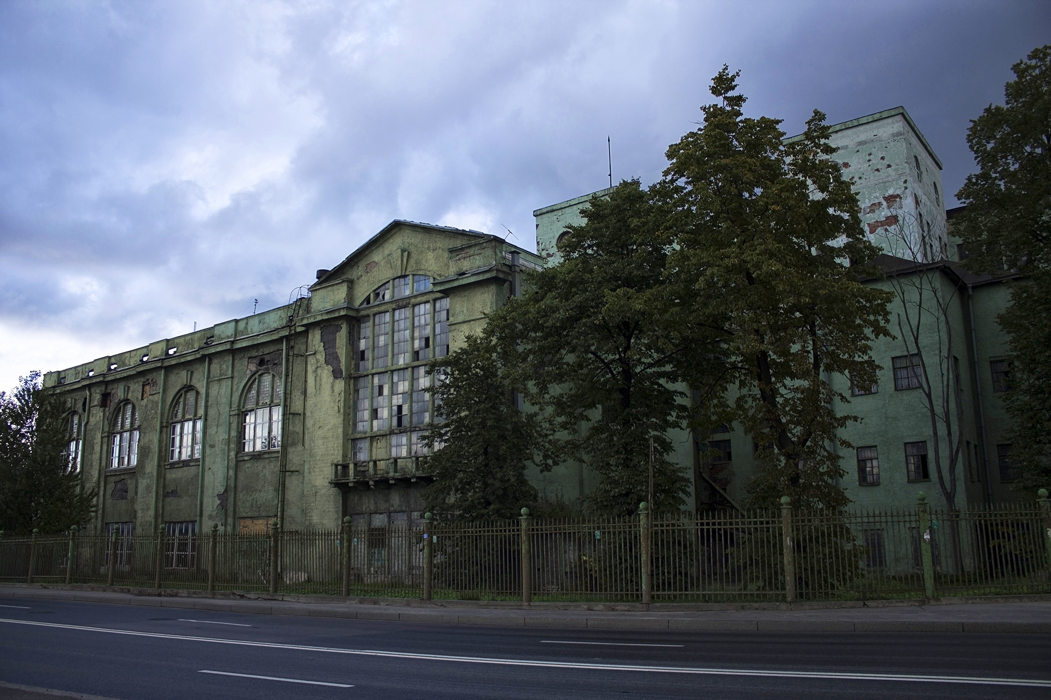 ГРЭС 'Красный Октябрь' (ТЭЦ №5): Октябрьская набережная, 108, Невский район, Санкт-Петербург